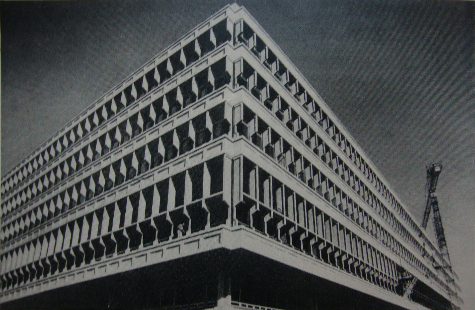 Pabellón de la Facultad de Ciencias Exactas y Naturales en la Ciudad Universitaria de Buenos Aires, en construcción. Publicada en una publicidad de Aluminio CAMEA, que fabricó 110 toneladas de perfiles para su construcción.